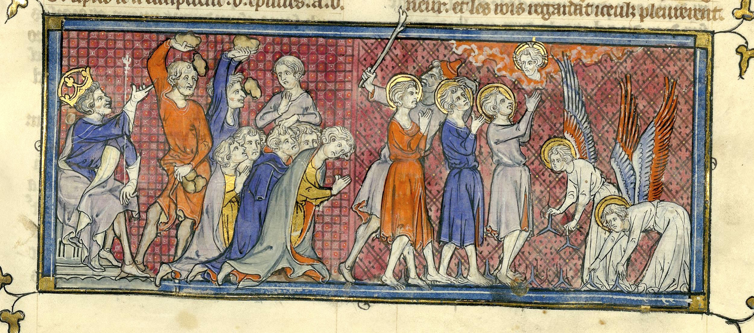 BnF Arsenal 5080 137